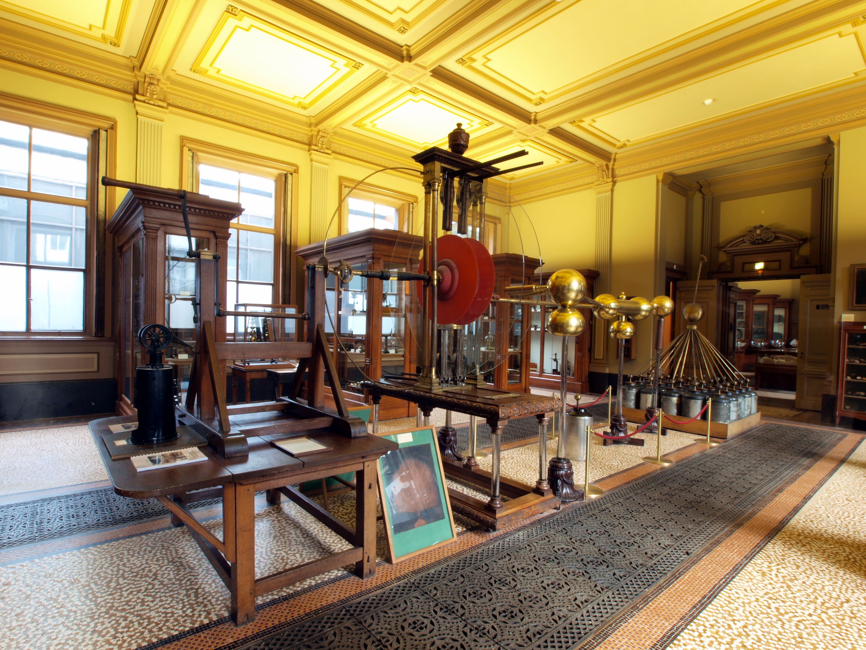 Haarlem, Pays-Bas. Musée Teyler (Teyler Museum), salle des Instruments (Instrumentenzaal): machine électrostatique de Martin van Marum.